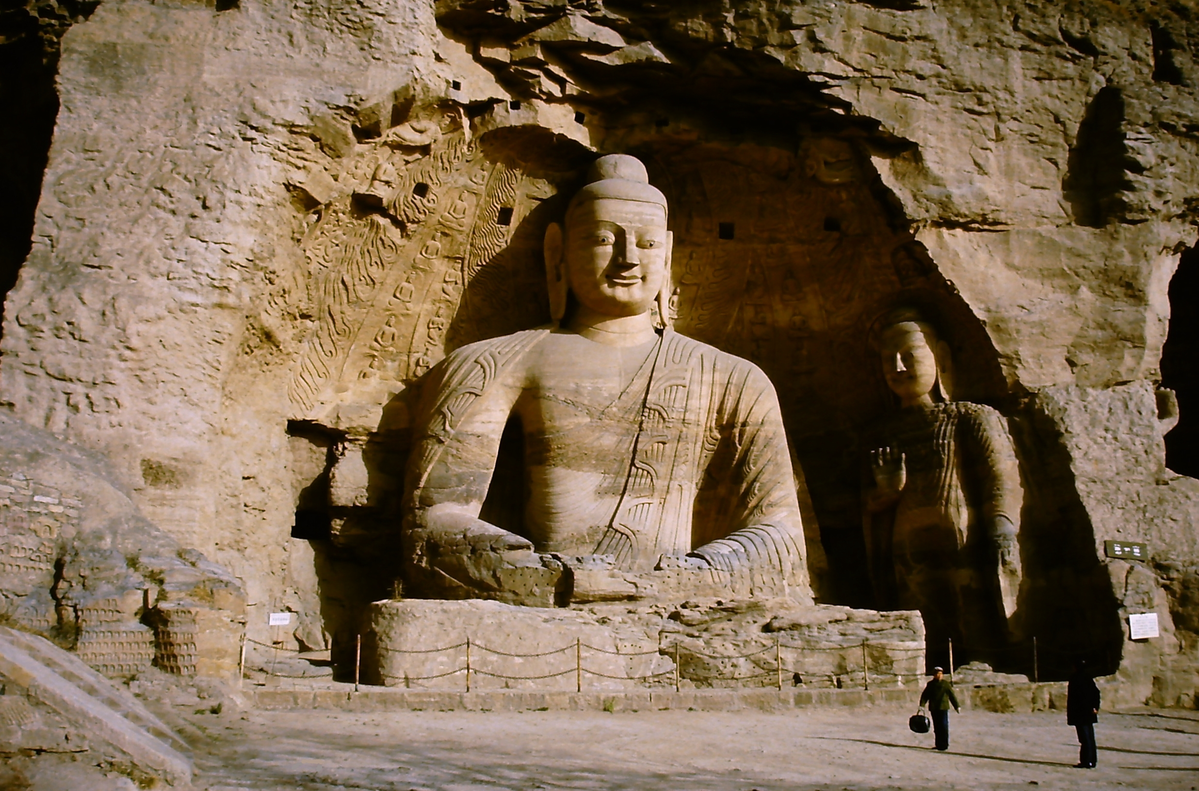 Yungang-Grotten